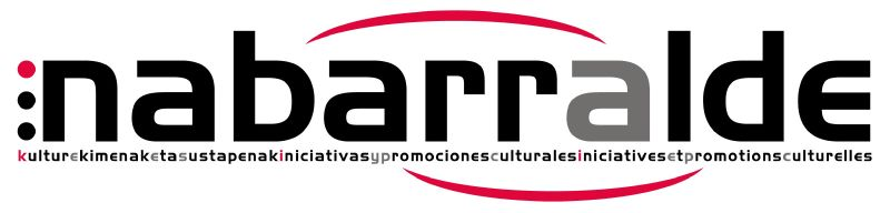 Nabarralderen logotipoa.